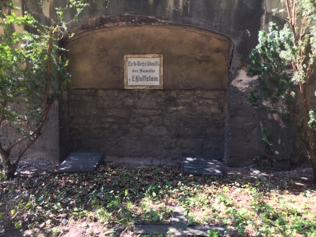 Erbbegräbnis von Egloffstein in Jena